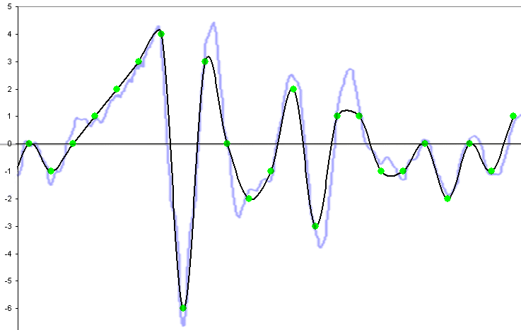 Rekonstrukce analogového signálu z digitálního při nedodržení Shannonova teorému.